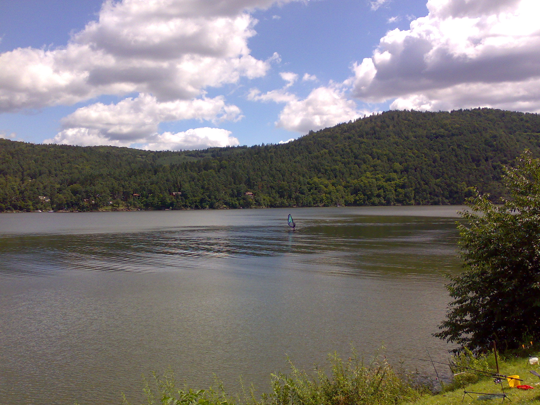 Pohled na slapskou přehradu